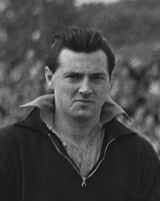 Rolf Leeser in 1954.